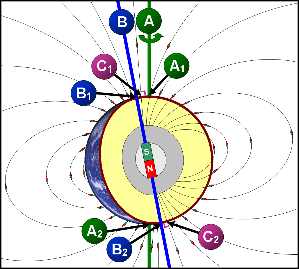 A=Geographic poles, B=Geomagnetic poles, C=Magnetic poles